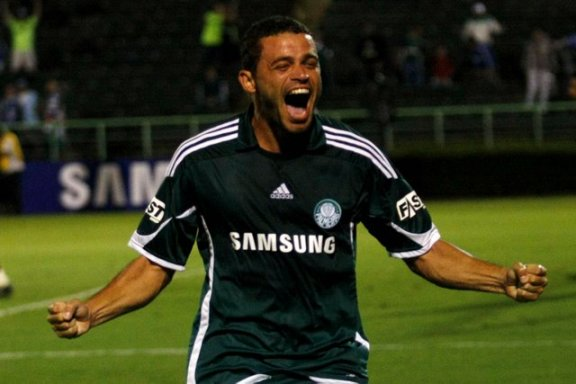 Comemoração gol de Edinho no Palmeiras em 2010